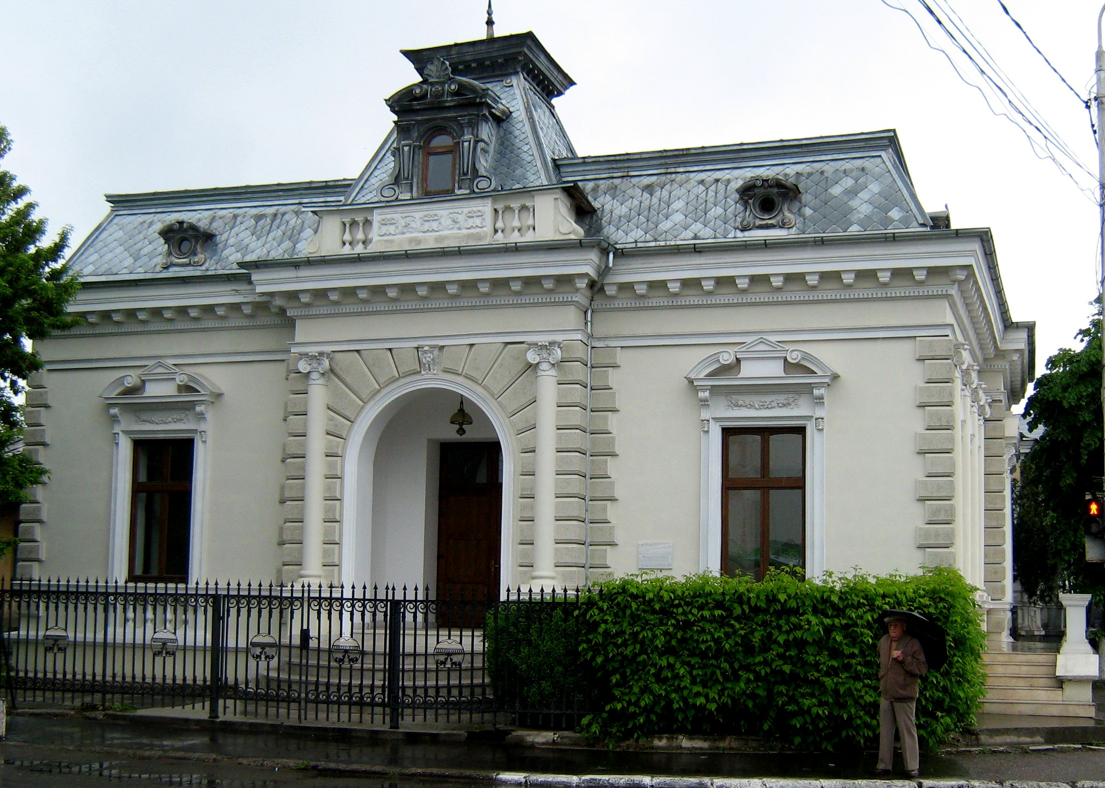 Casă, azi Sediul PRM și al Sindicatului Liber al Pensionarilor